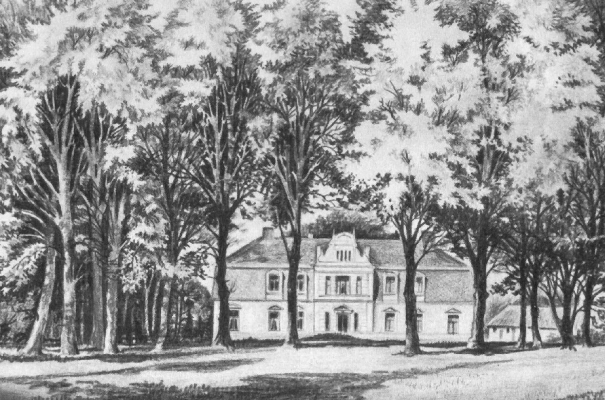 Rittergut Dolgen, Gutshaus den Ministers Leopold von Plessen Datum: um 1890 (nach Umbau durch Gustav Frhr. v. Plessen) Quelle: Scan aus dem Buch von M. Naumann: "Die Plessen", C. A. Starke Verlag, Limburg, 1971